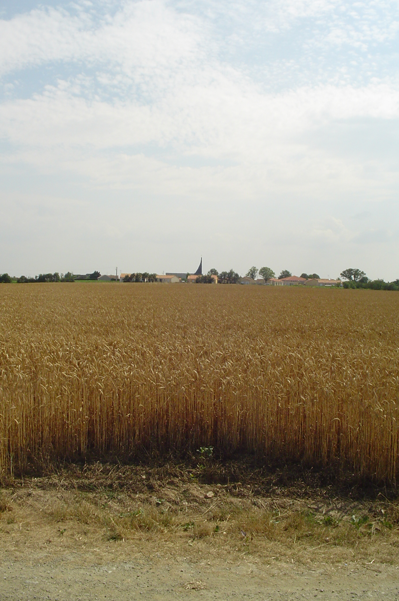 Campagne du Fief-Sauvin (Maine-et-Loire, France) et son église contemporaine au fond.